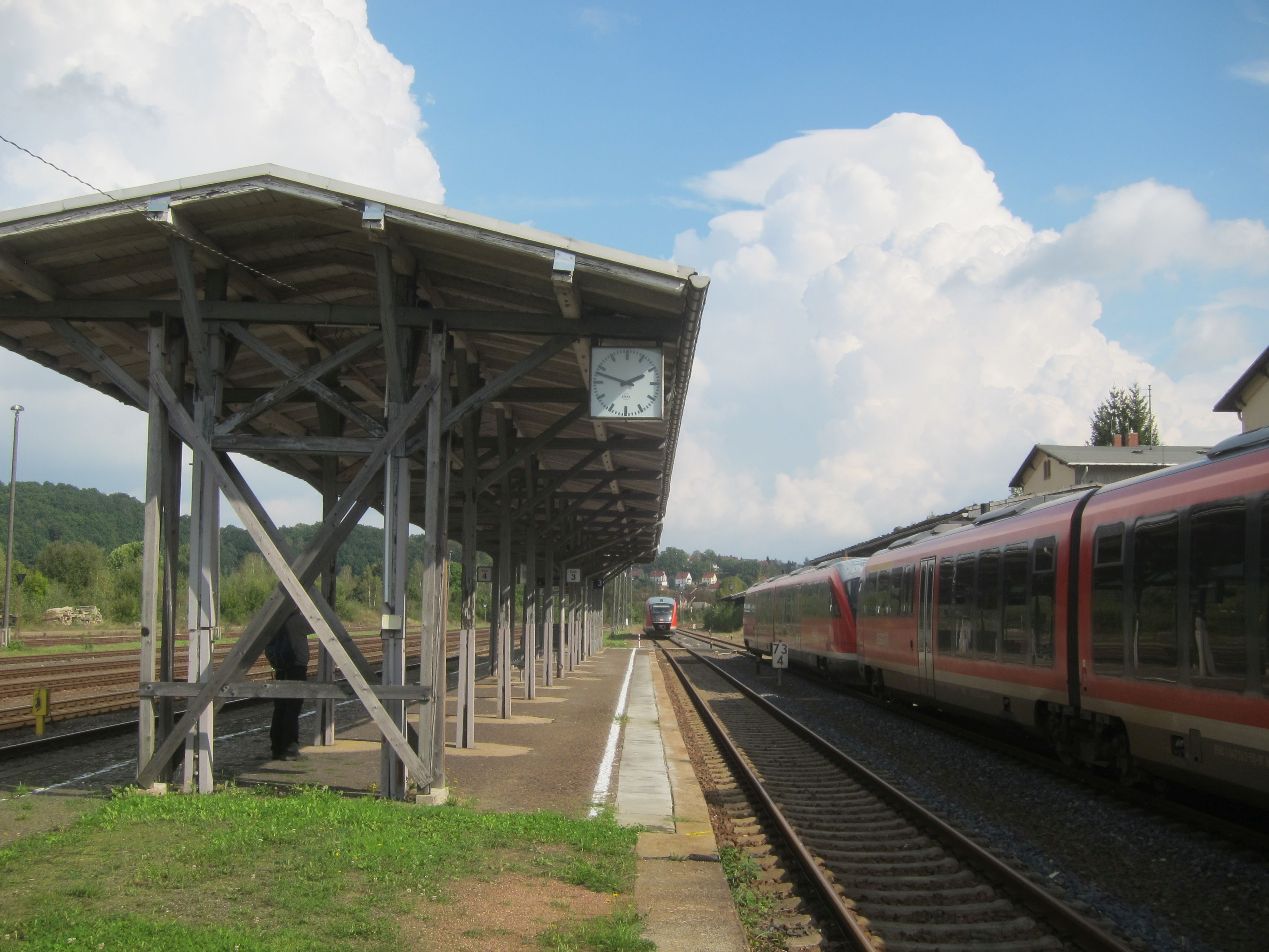 Bahnhof Nossen, Bahnsteigdach des Inselbahnsteigs